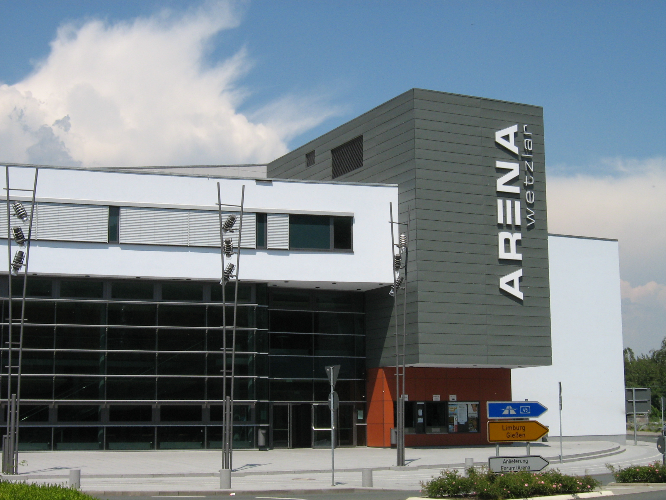 Mittelhessen-Arena in Wetzlar, Germany, events like handball (HSG Wetzlar)